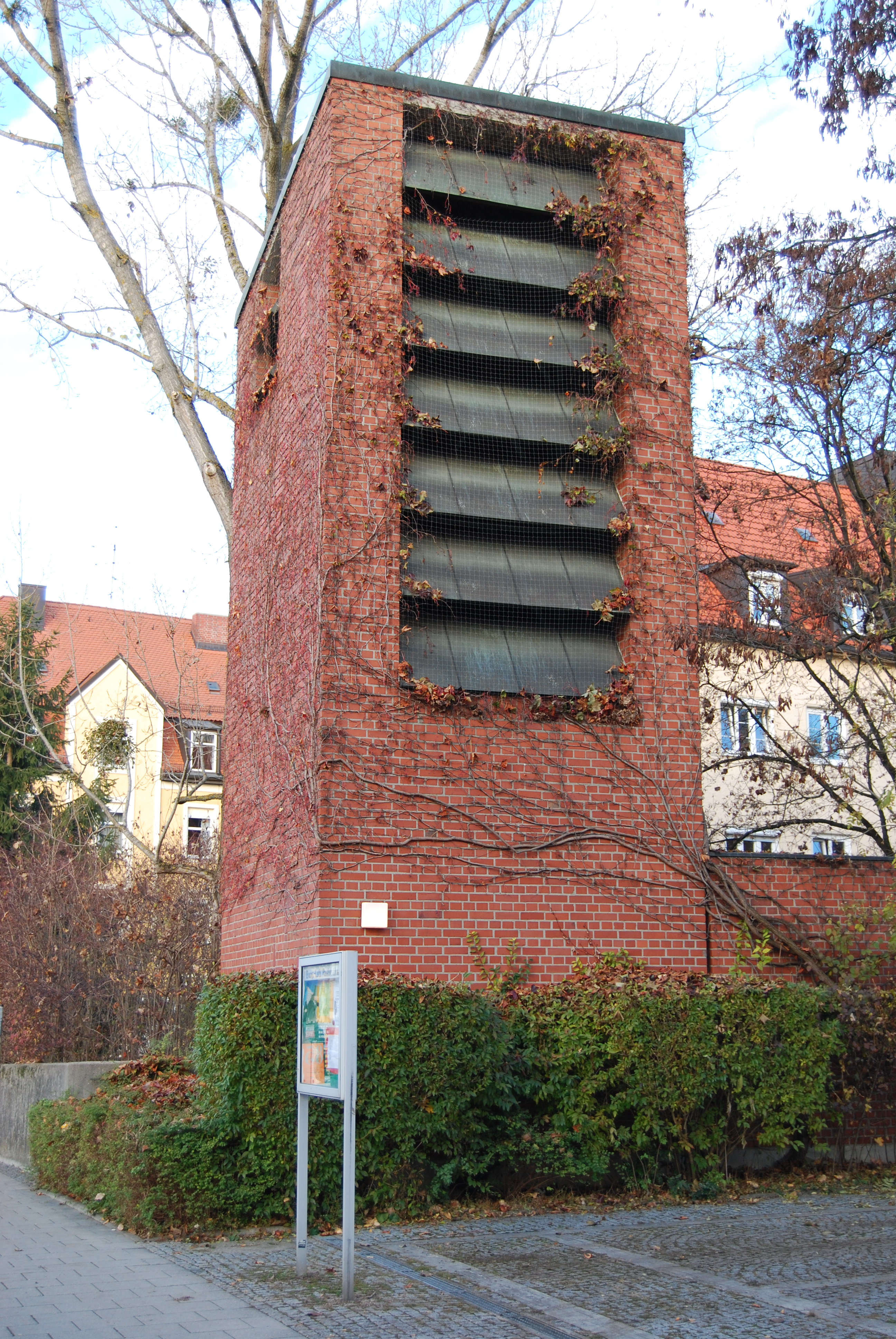 Glockenturm der Passionskirche München-Thalkirchen